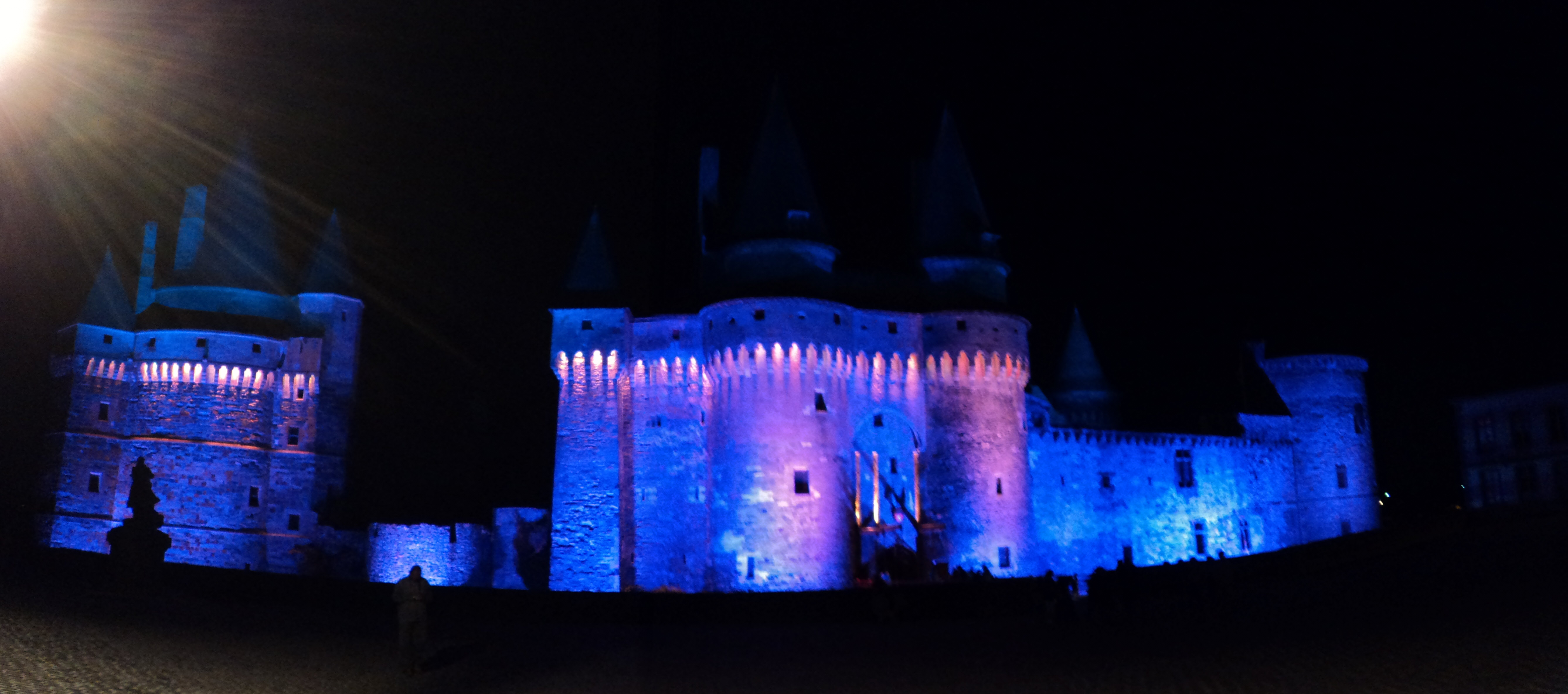 Le Château de Vitré la nuit. Illumination à l'occasion d'un spectacle son et lumière durant l'été 2011.